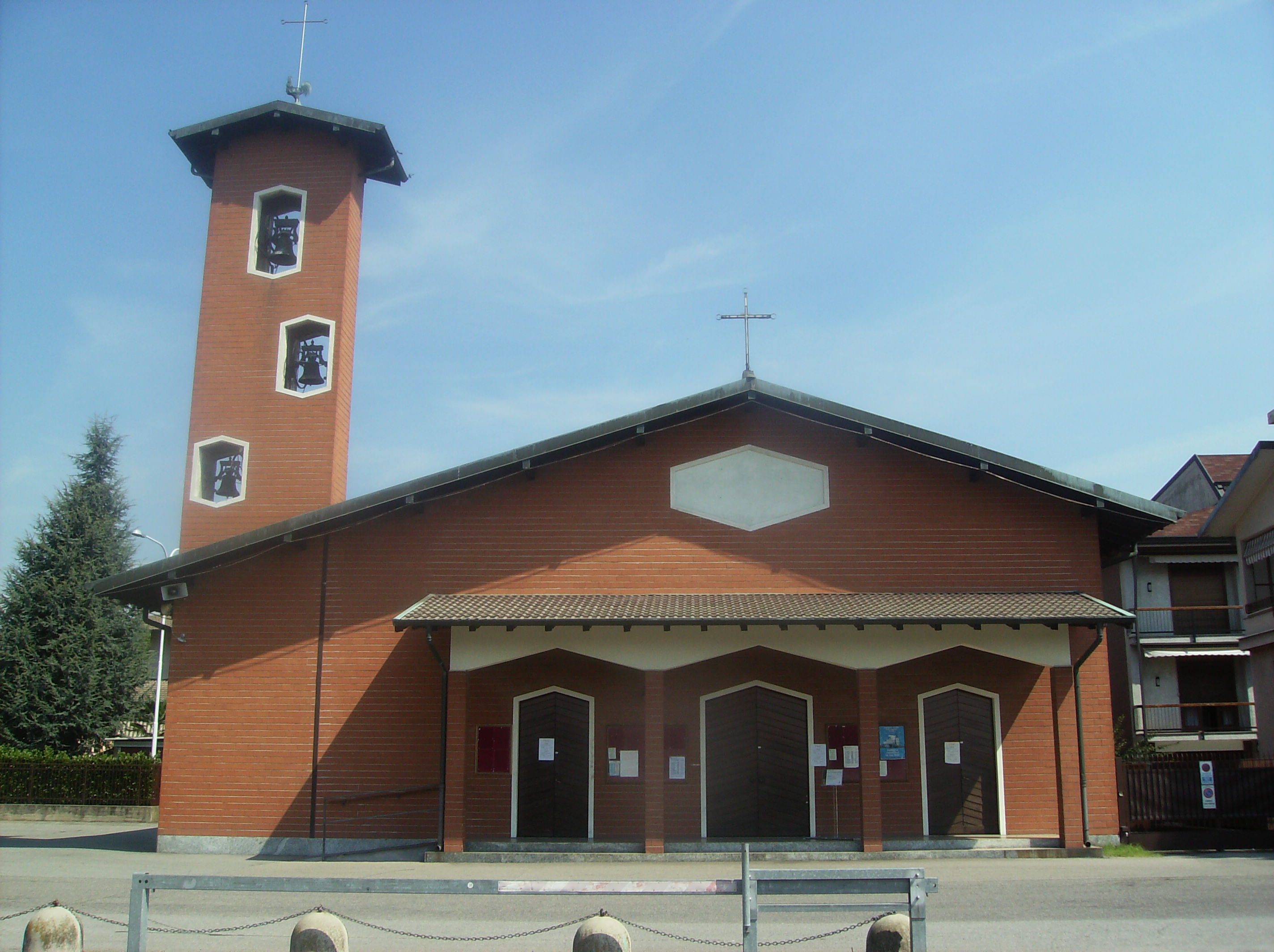 Chiesa del Santissimo Redentore - Busto Arsizio